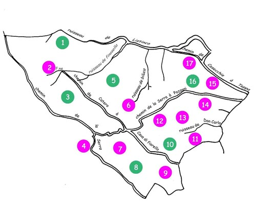 relevé toponymique